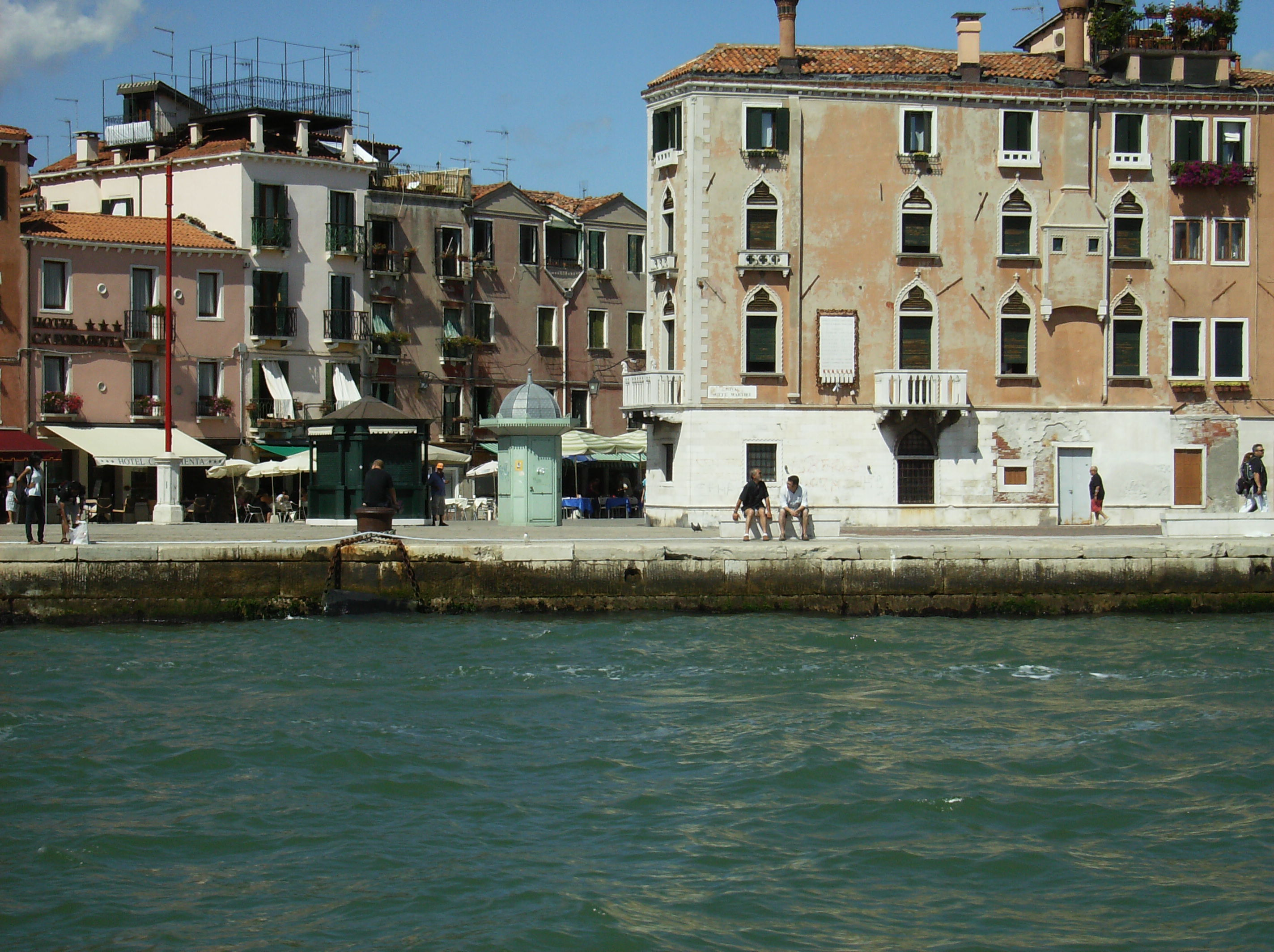 riva dei sette martiri venise